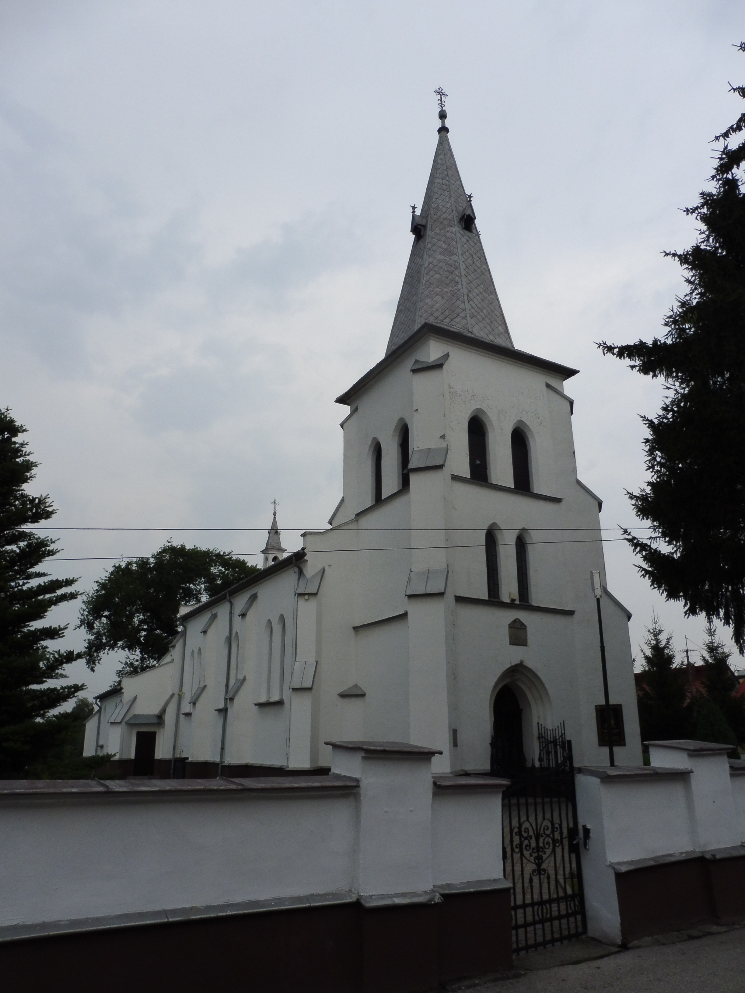 Koszyce, Plac Jana Pawła II 1 - rzymskokatolicki kościół parafialny pw. św. Marii Magdaleny